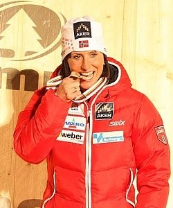 Dekoracja medalowa biegu indywidualnego kobiet na 30 km techniką klasyczną